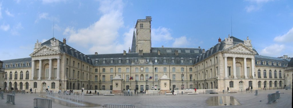 Panoramique du palais des Ducs de Bourgogne à Dijon - Bourgogne - France